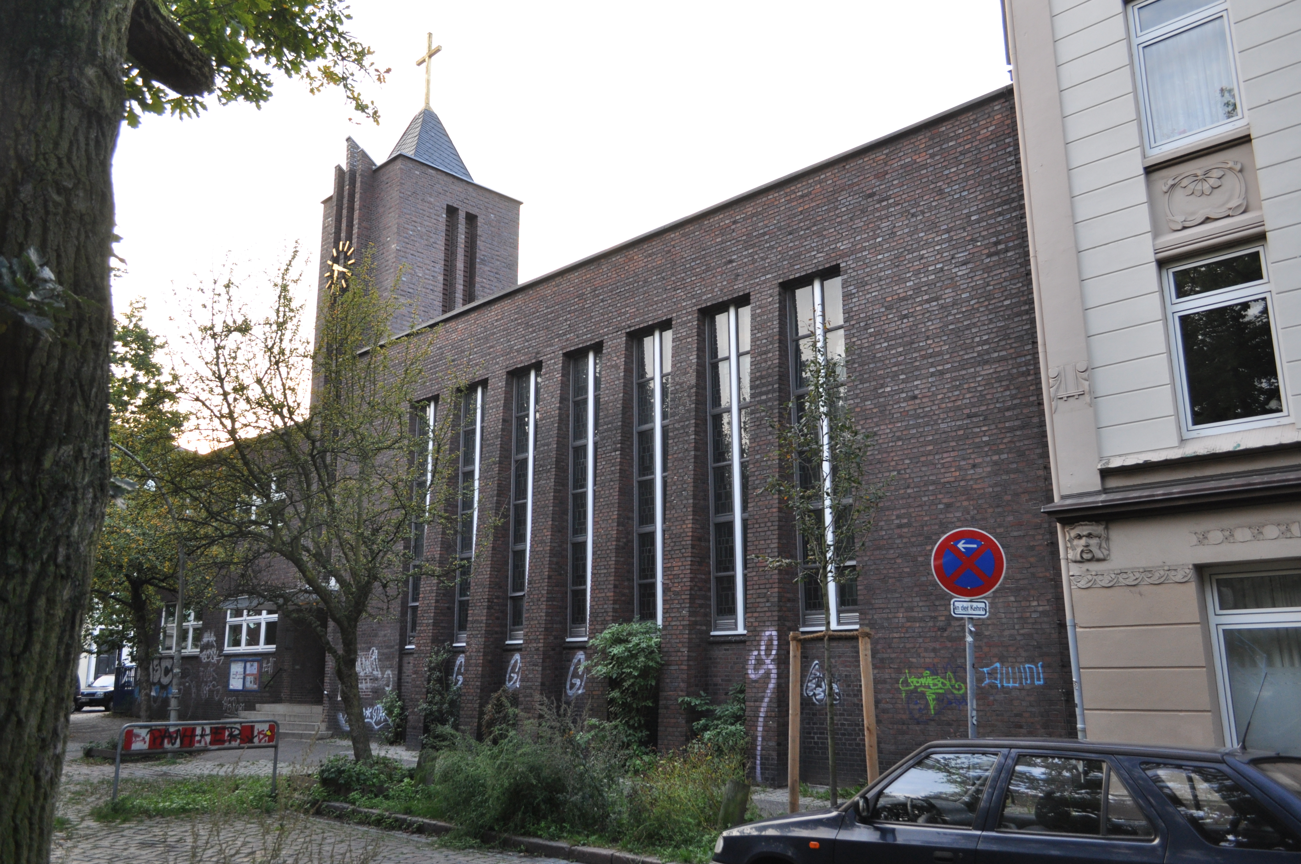 Osterkirche in Hamburg-Ottensen. This is a photograph of an architectural monument.